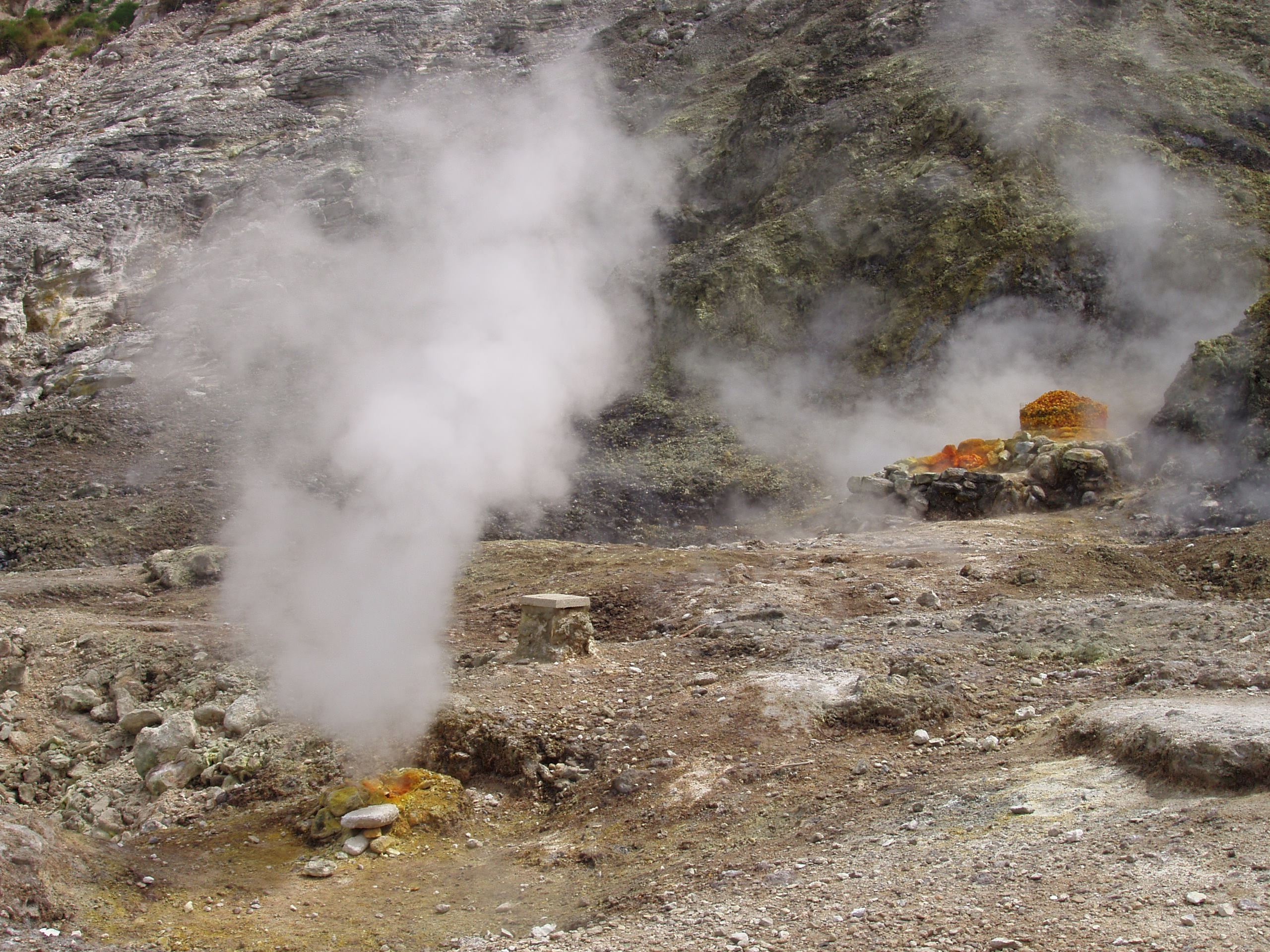 Campi Flegrei: Vulcano Solfatara, fumarola della "Bocca grande".